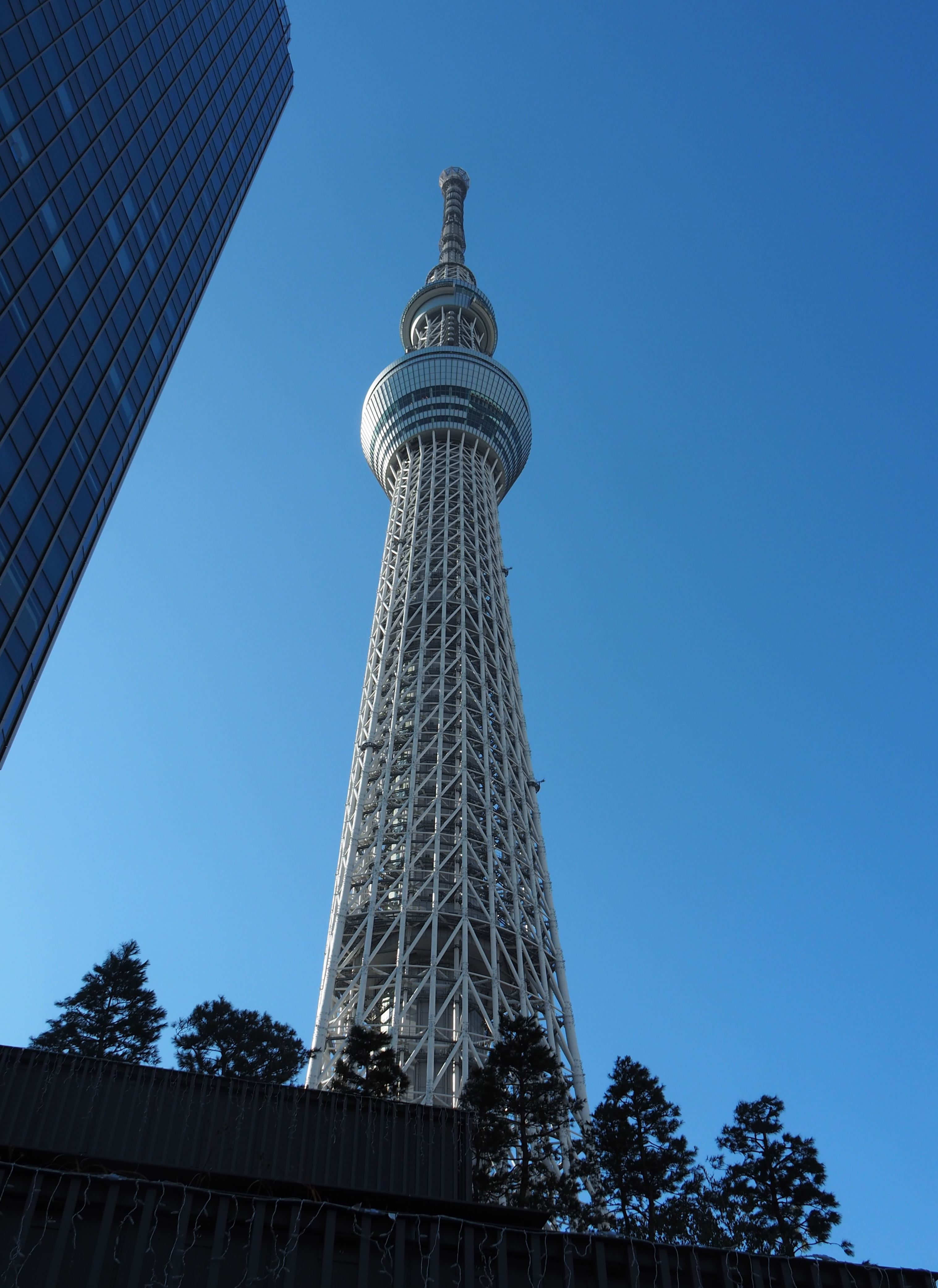 Tokyo Skytree